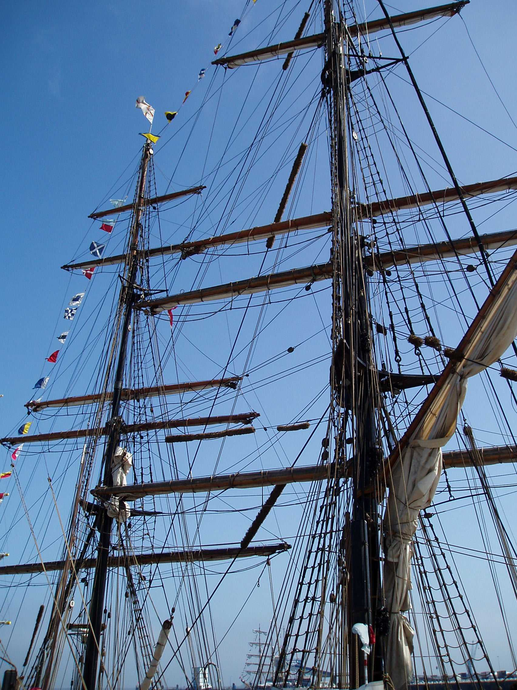 Le Roald Amundsen, brick reconstruit en 1992 par la société "LebenLernen auf Segelschiffen" ("Learning to Live on Sailing Ships") Photo prise le 13 Juillet 2005 à Cherbourg lors de la Tall Ships' Race Author : Loïc Evanno